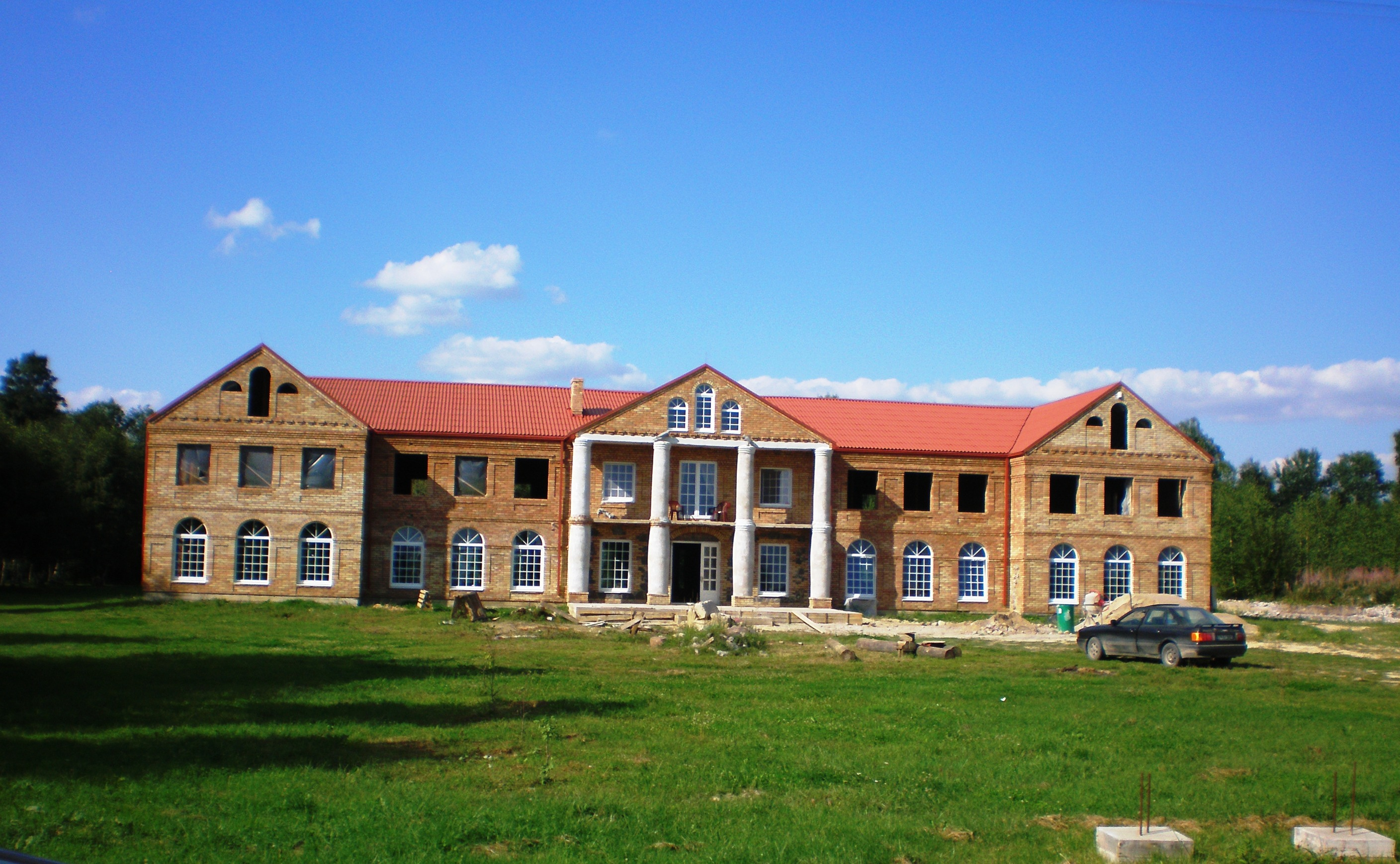 Rūmai(?) Maleikoniuose, Kėdainių raj.